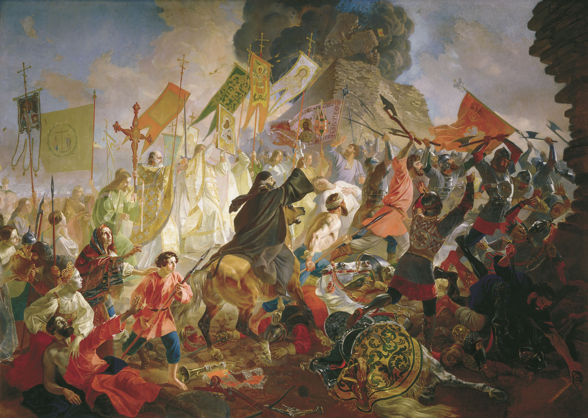 Осада Пскова польским королём Стефаном Баторием в 1581 году.